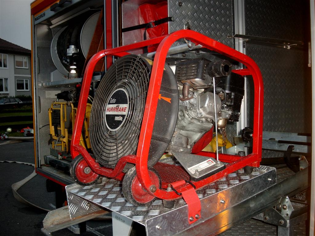 Turbolüfter